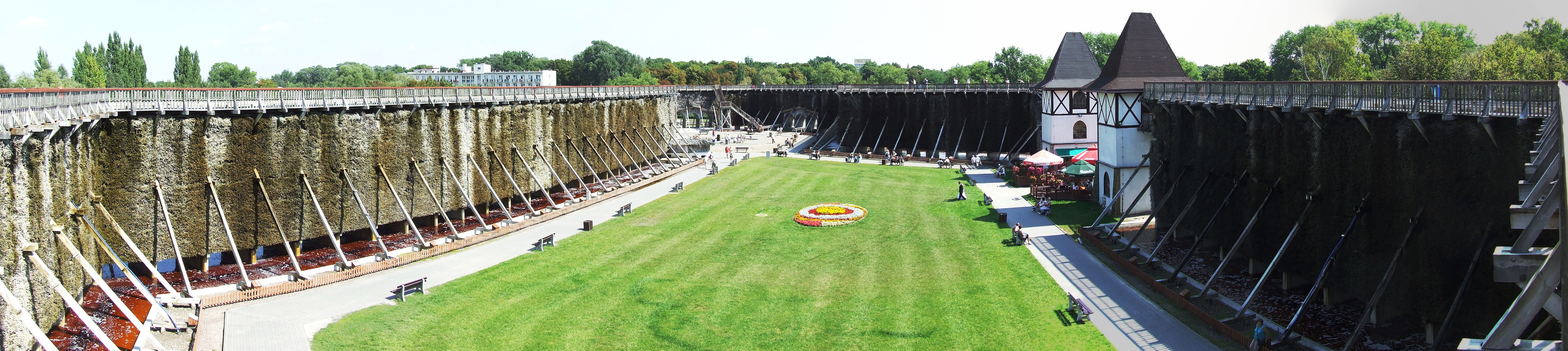 Tężnia w Inowrocławiu - widok z tarasu.